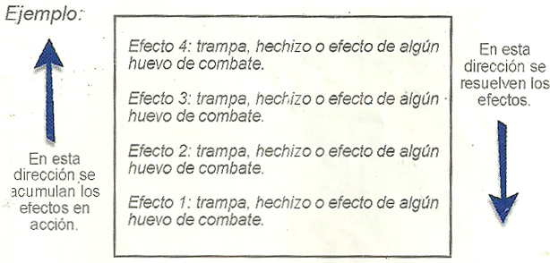 Ejemplo